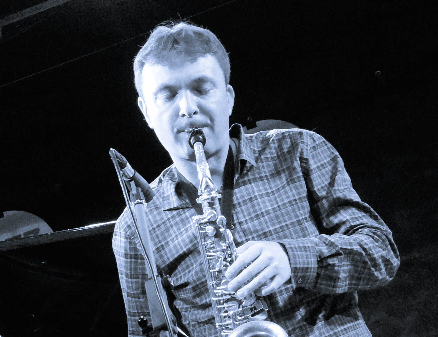 13.10.2017. КЦ ДОМ, Концерт в рамках совместного проекта фестиваля Гёте-Института "Джаз осенью" и фестиваля Leo Records.